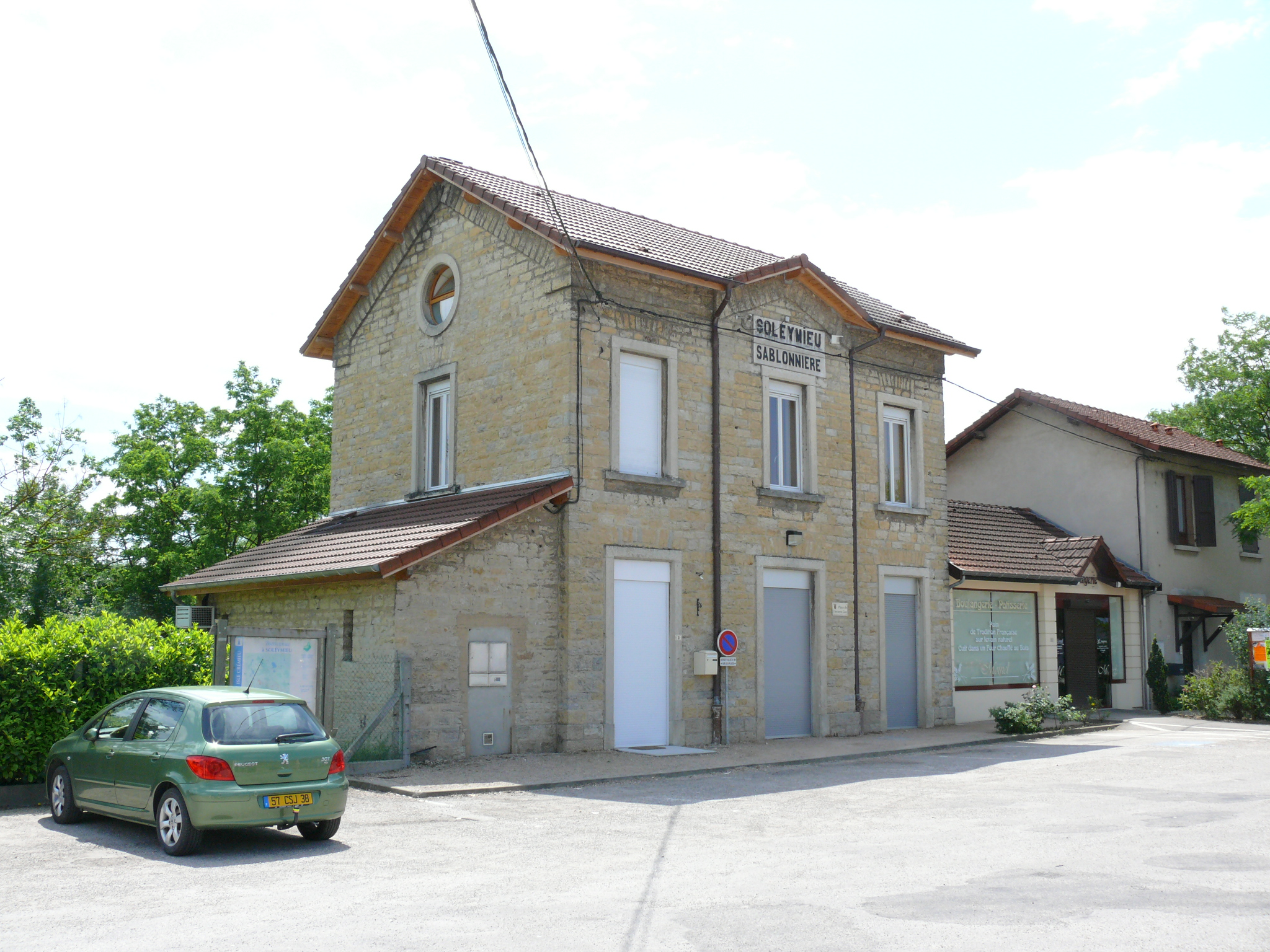 SOLEYMIEU-CHARBONNIERE : La gare du Chemin de fer de l'Est de Lyon